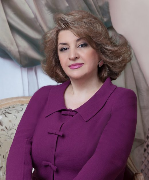 Rita Sargsyan nimg